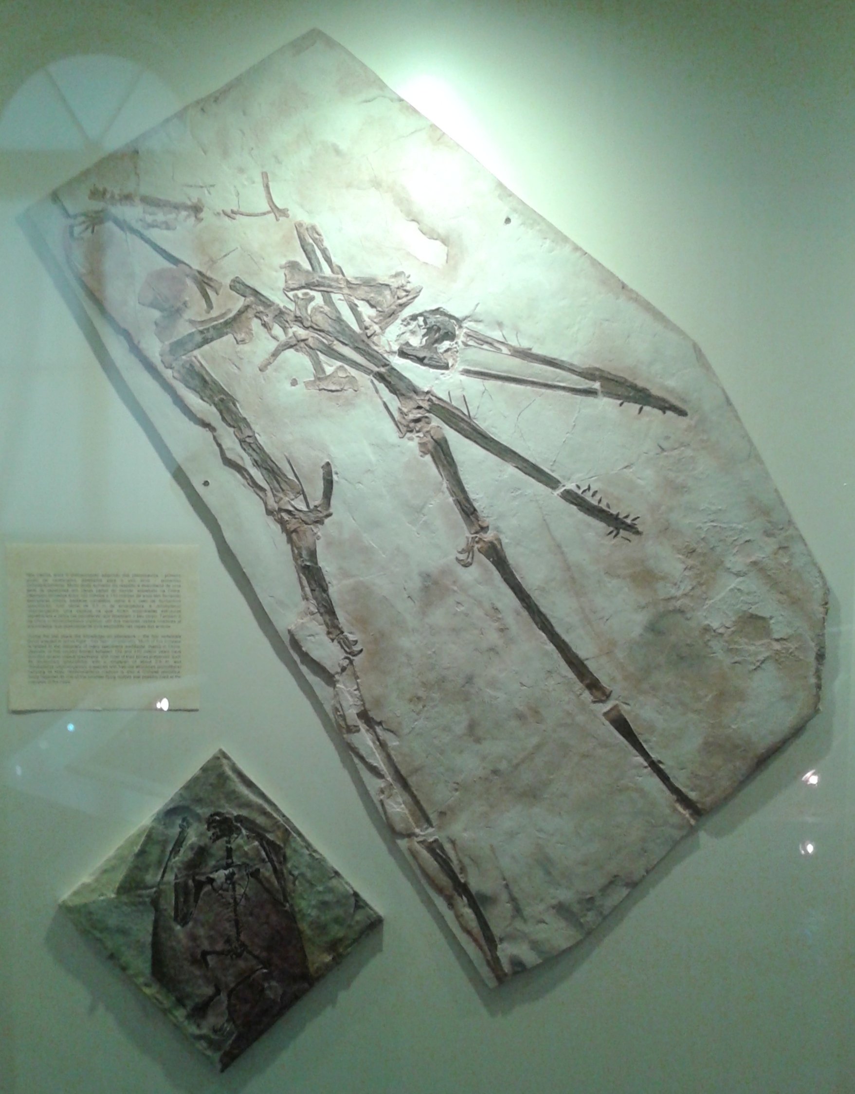 Português do Brasil: Nurhachius ignaciobritoi, Jeholopterus fossilizados no acervo do Museu Nacional/UFRJ. Rio de Janeiro, Brasil.